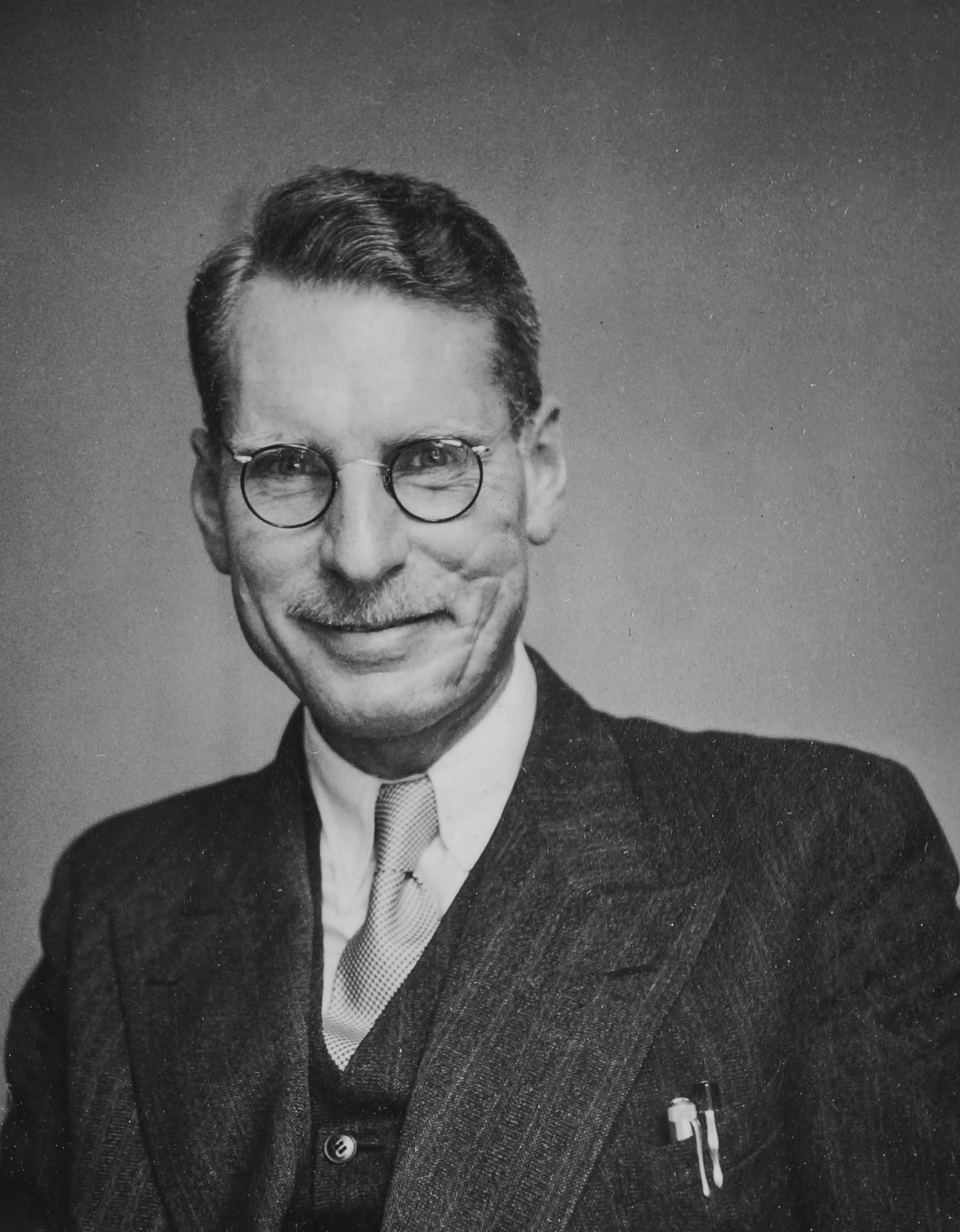 Prof. Ladislaus v. Rabcewicz